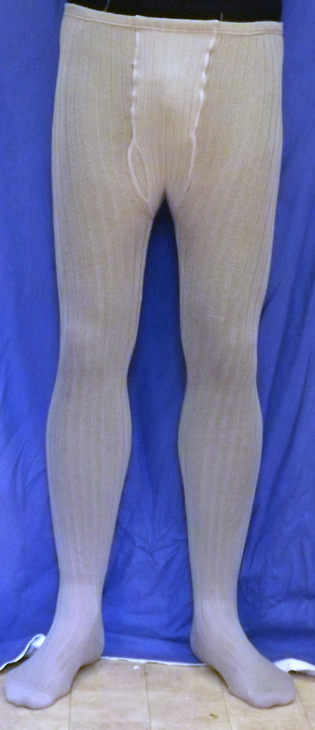 Strickstrumpfhose, Männliche Form mit Eingriff und breit gerippt